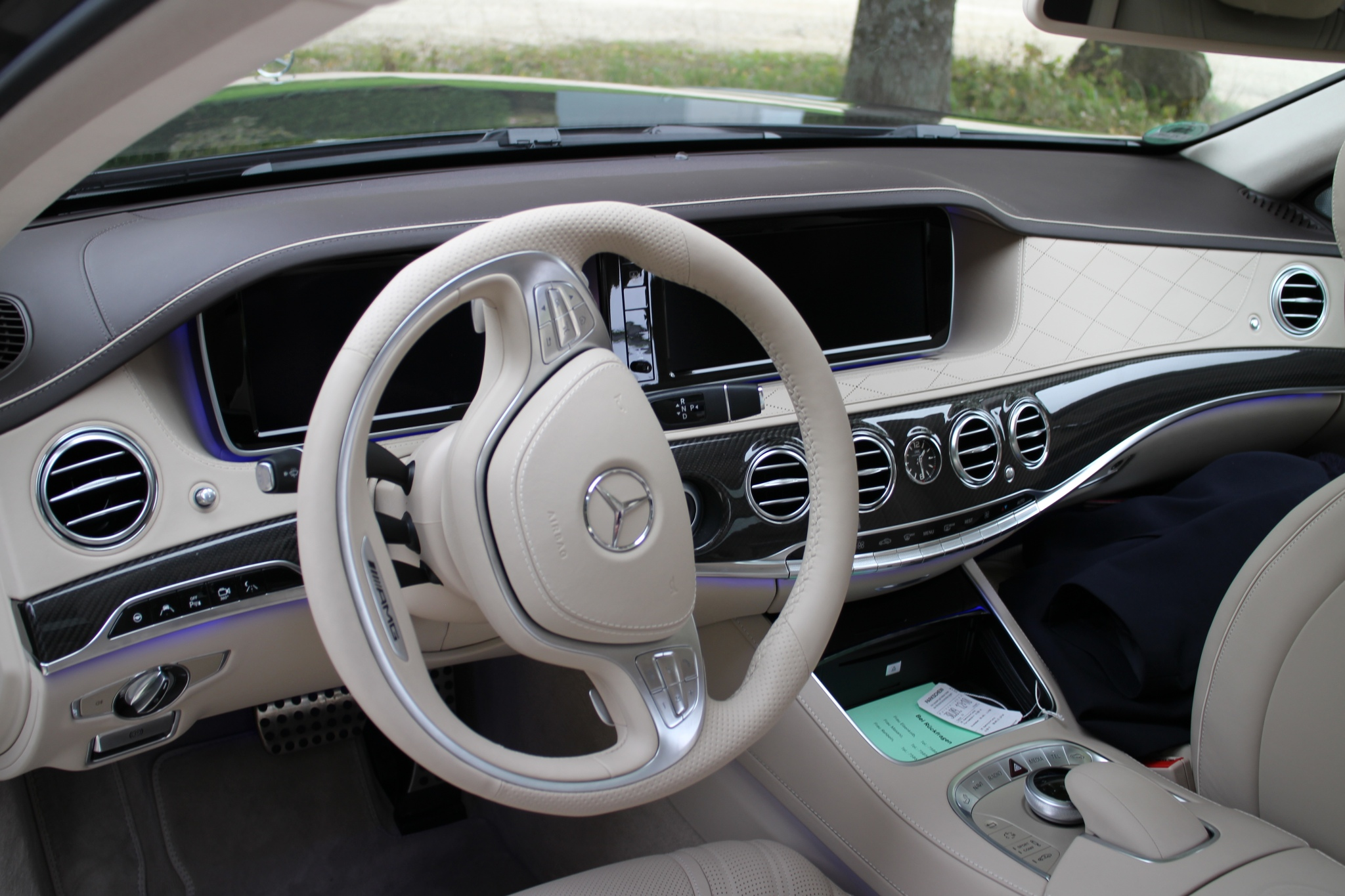 S63 AMG 2013